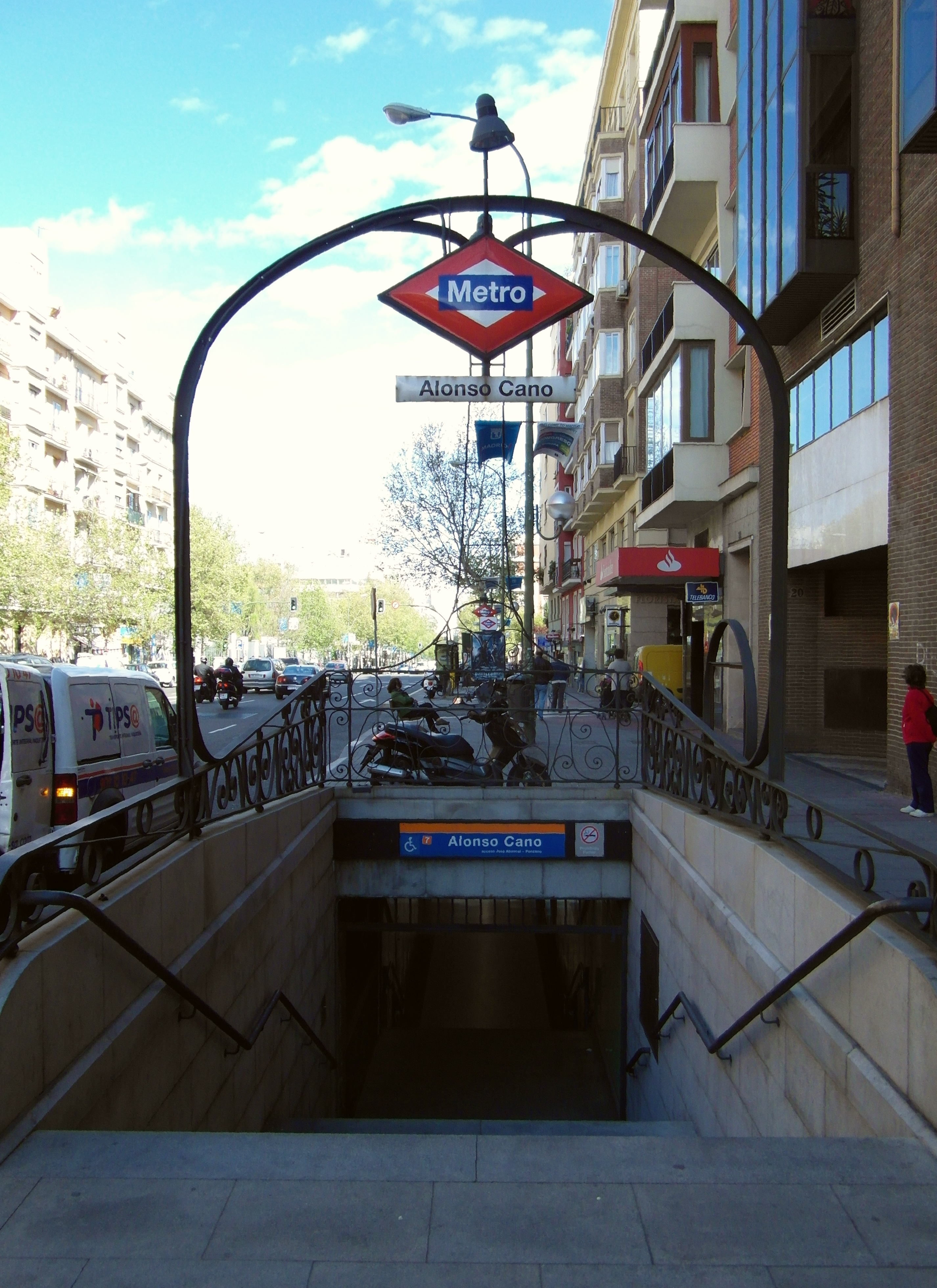 Madrid - Metro - Estación de Alonso Cano